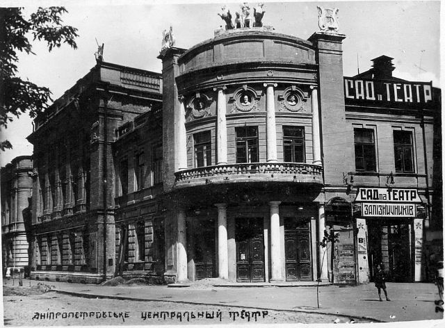 Театр Шевченка у Дніпропетровську.